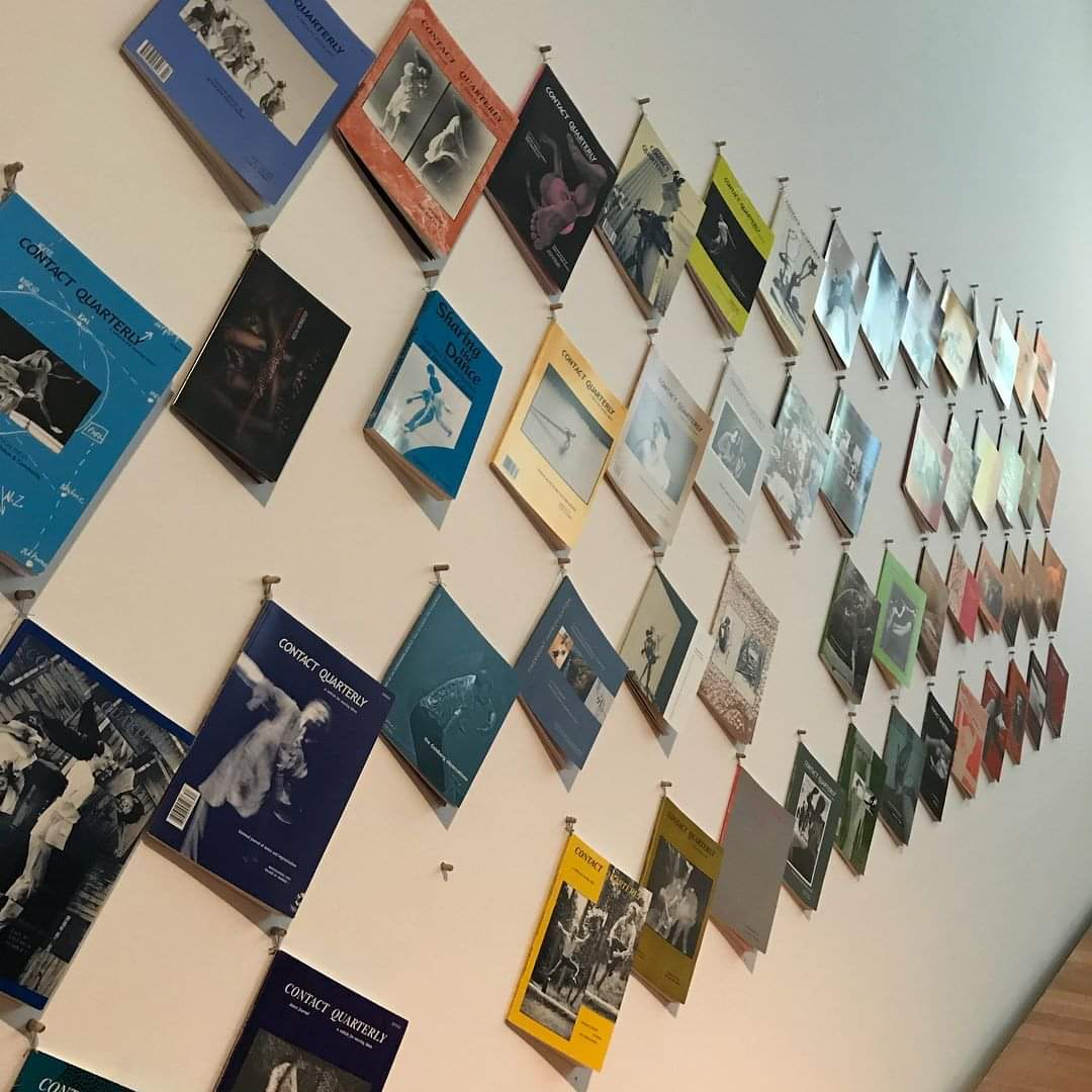 A wall of Contact Quarterlys, an installation in Steve Paxton: Drafting Interior Techniques, Culturgest, Lisbon, 2019.